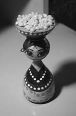 es una imagen en b/N codificada en 8 bits, con lo cual con 256 niveles de gris